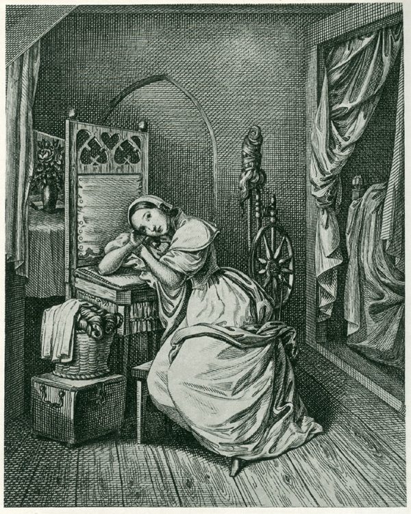 Illustration zu Goethe, Faust I, Szene: Gretchens Stube, V. 3402